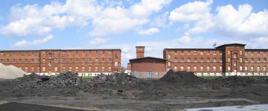 das ehem. Gefängnis Rummelsburg (vormals Städtisches Arbeitshaus)